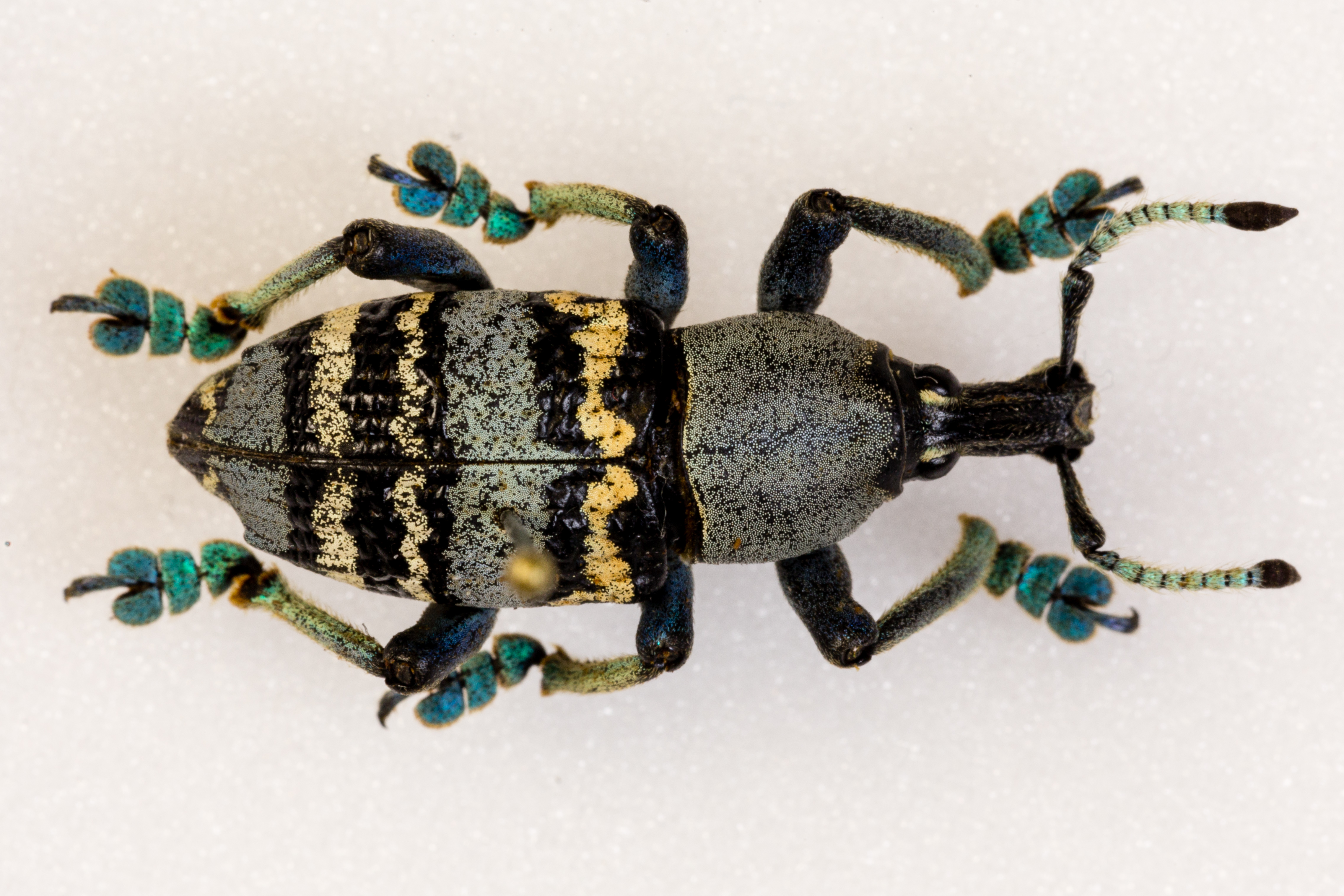 Boîte pédagogique sur les insectes de l'indomalais insulaire. Eupholus nickerli.